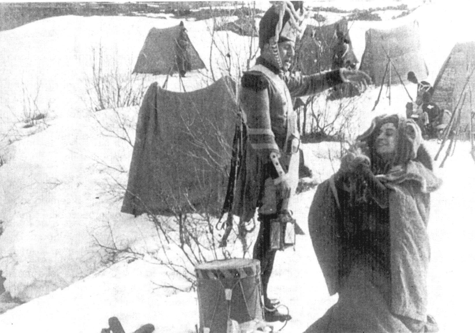 Il granatiere Roland (Maggi, 1911) - foto di scena con Alberto Capozzi e Mary Cleo Tarlarini